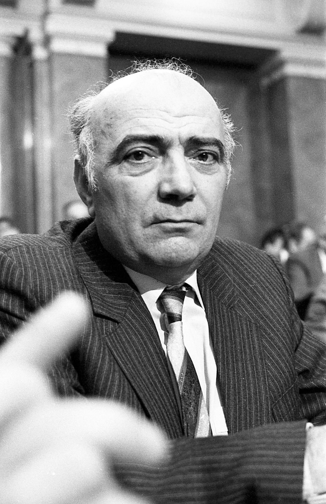 Srpski (latinica): Boško Krunić (Prhovo, kod Pećinaca, 1929 — Novi Sad, 23. januar 2017), društveno-politički radnik SFR Jugoslavije, SR Srbije i SAP Vojvodine.